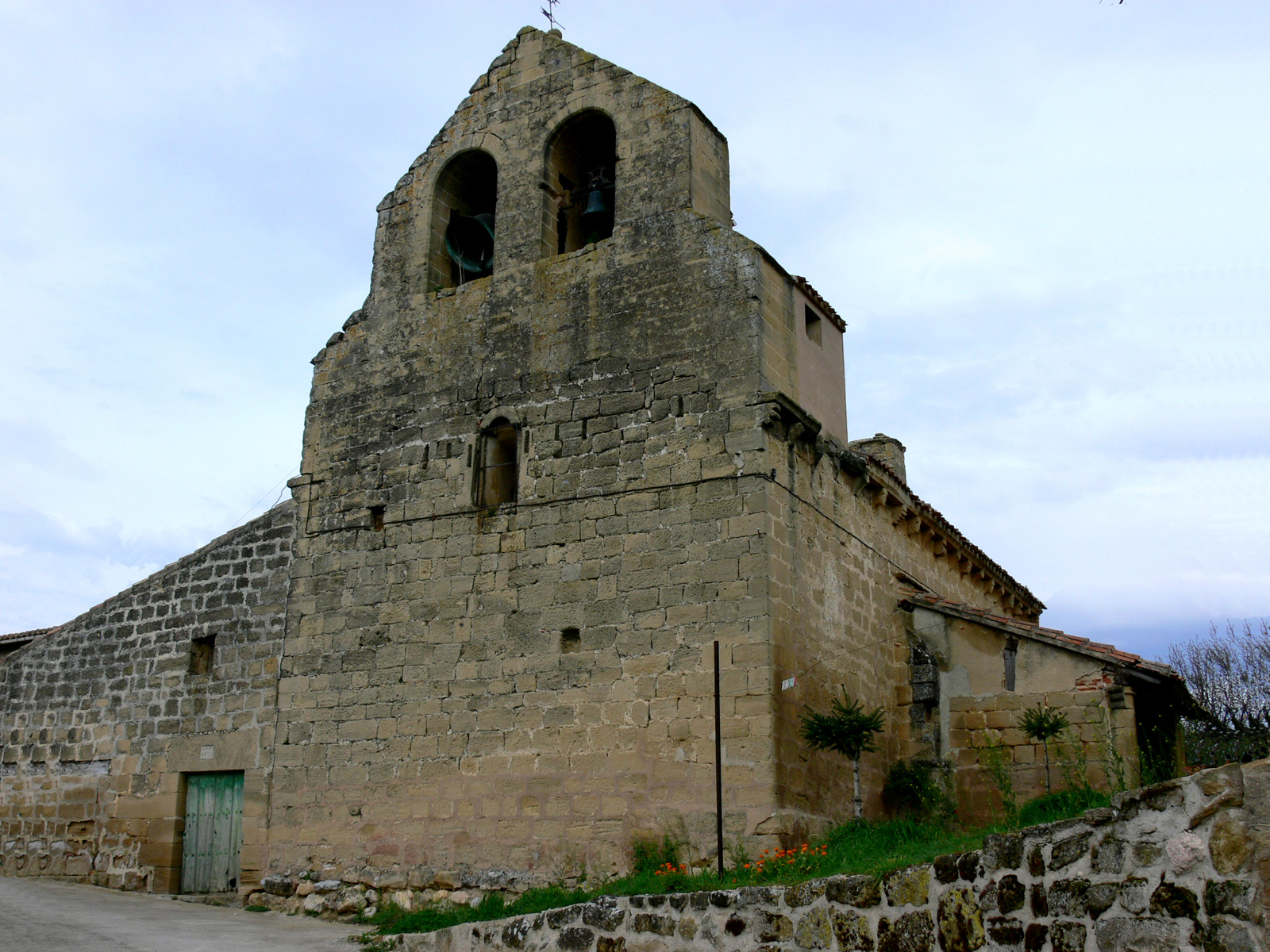 Iglesia de San Julián en Castilseco, aldea de Galbárruli, La Rioja - España.